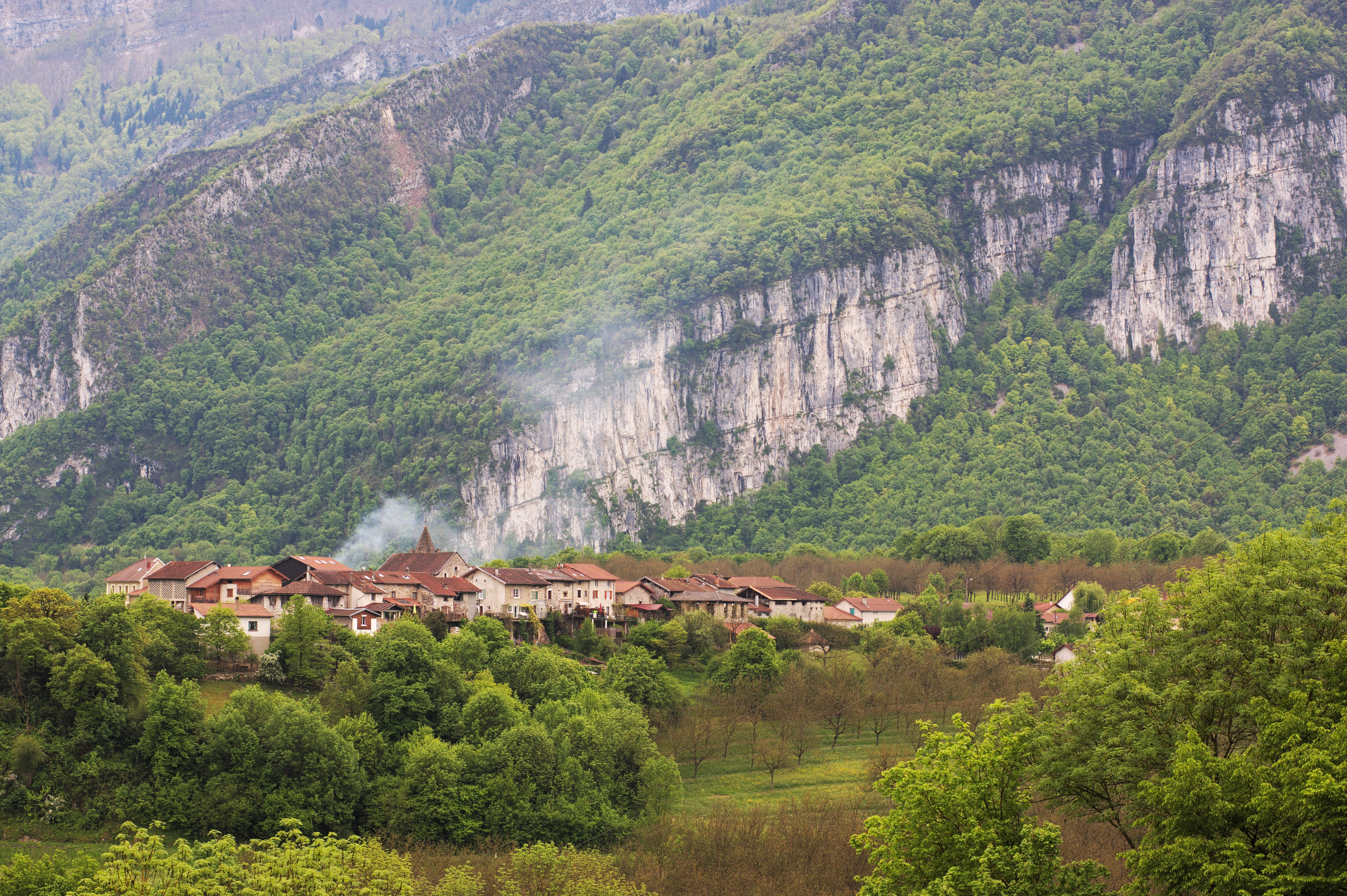 Le village de Rovon, Isère (38), France vu depuis la route de Riquettière